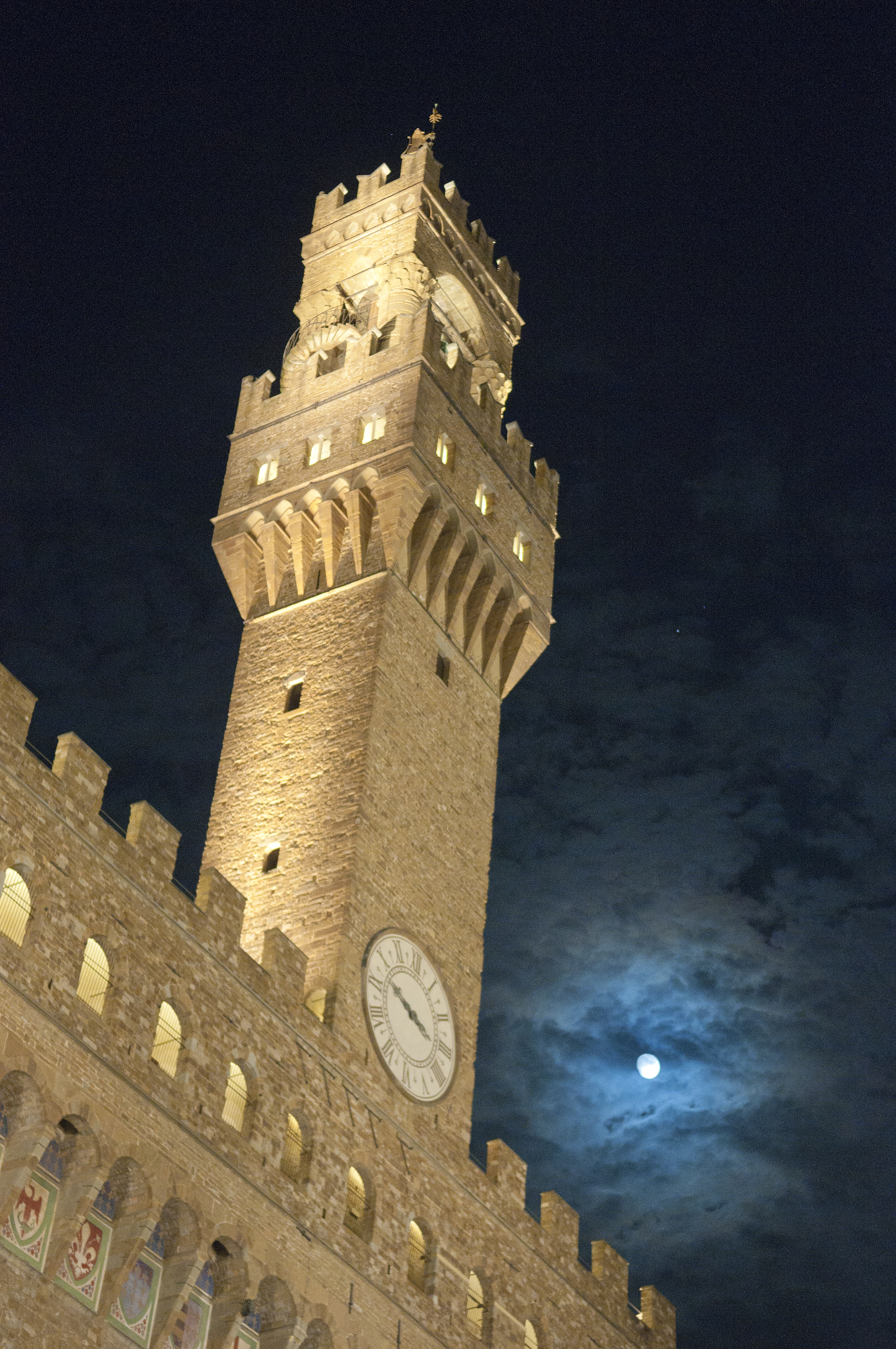 the Palazzo Vecchio, Florence